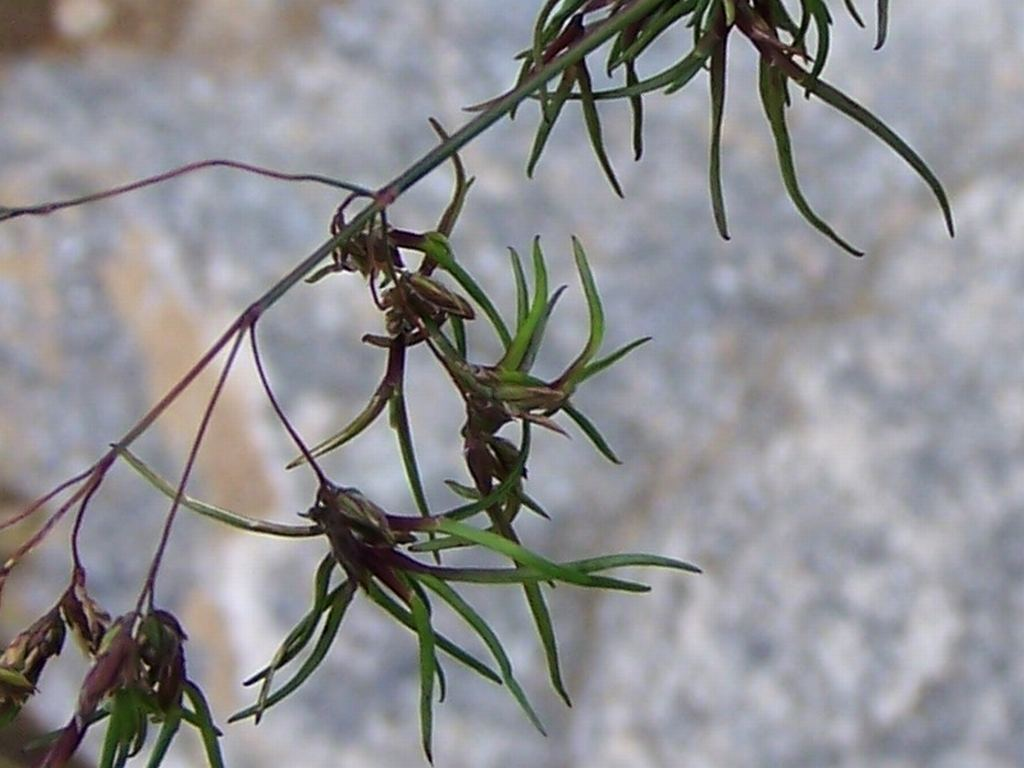 Poa alpina subs. vivipara (pl. wiechlina alpejska, f. żyworodna)